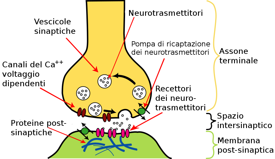 Dei circa 30 neurotrasmettitori che sono stati identificati, i ricercatori ne hanno correlati 3 tra la loro funzione e lo sviluppo della depressione. Questi sono la serotonina, la noradrenalina e la dopamina. Gli antidepressivi influenzano il bilancio complessivo di questi tre neurotrasmettitori all'interno delle strutture del cervello che regolano le emozioni, le reazioni allo stress, il sonno, l'appetito e la sessualità.